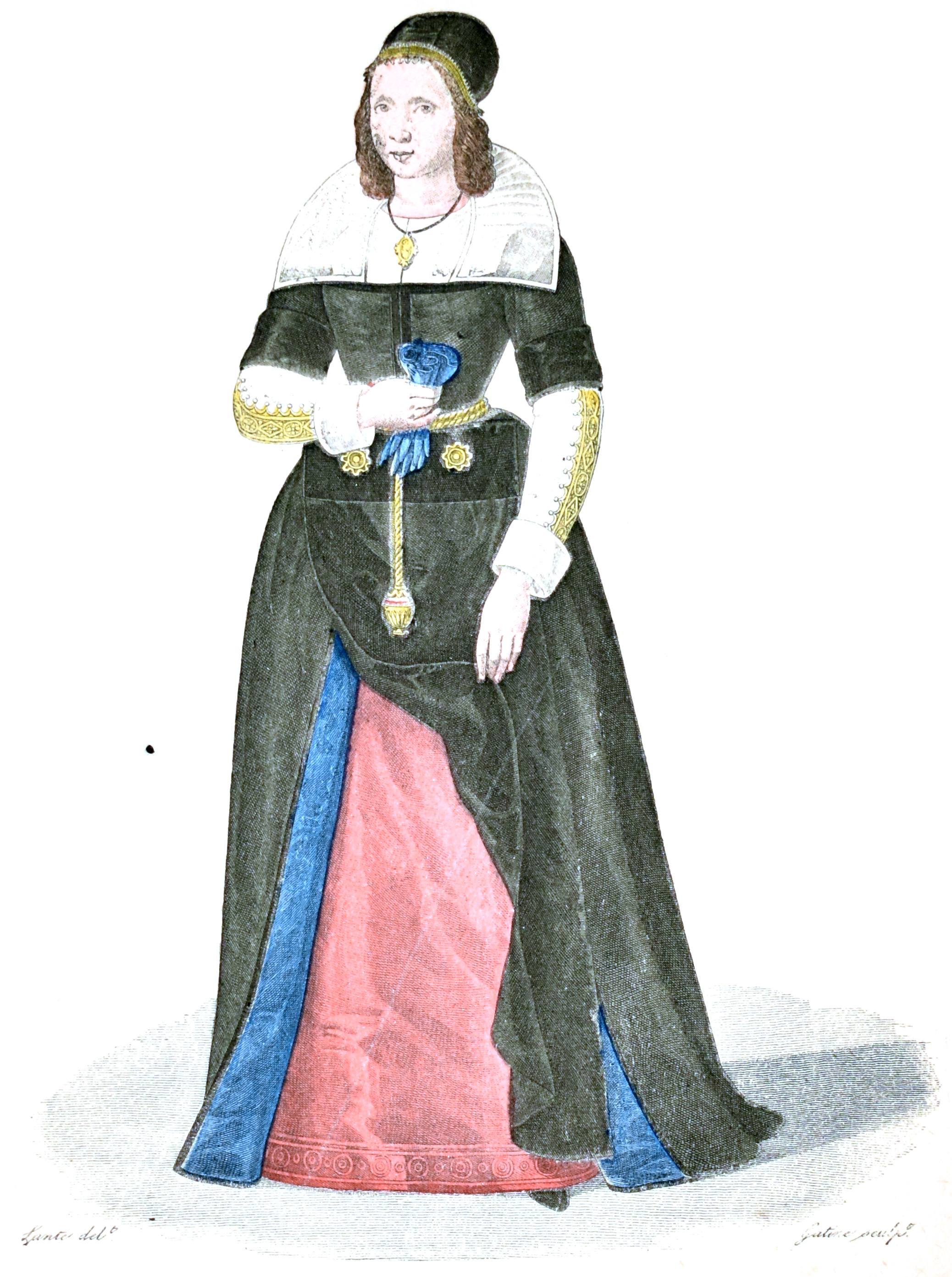 Gravure extraite de La Mode par l’Image du XIIe au XVIIIe Siècle.